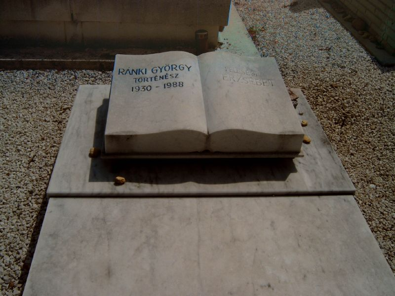 Ránki György (Bp., 1930. aug. 4. – Bp., 1988. febr. 19.): történész, egyetemi tanár sírja Budapesten. Kozma utcai izraelita temető: 5B-1-12.